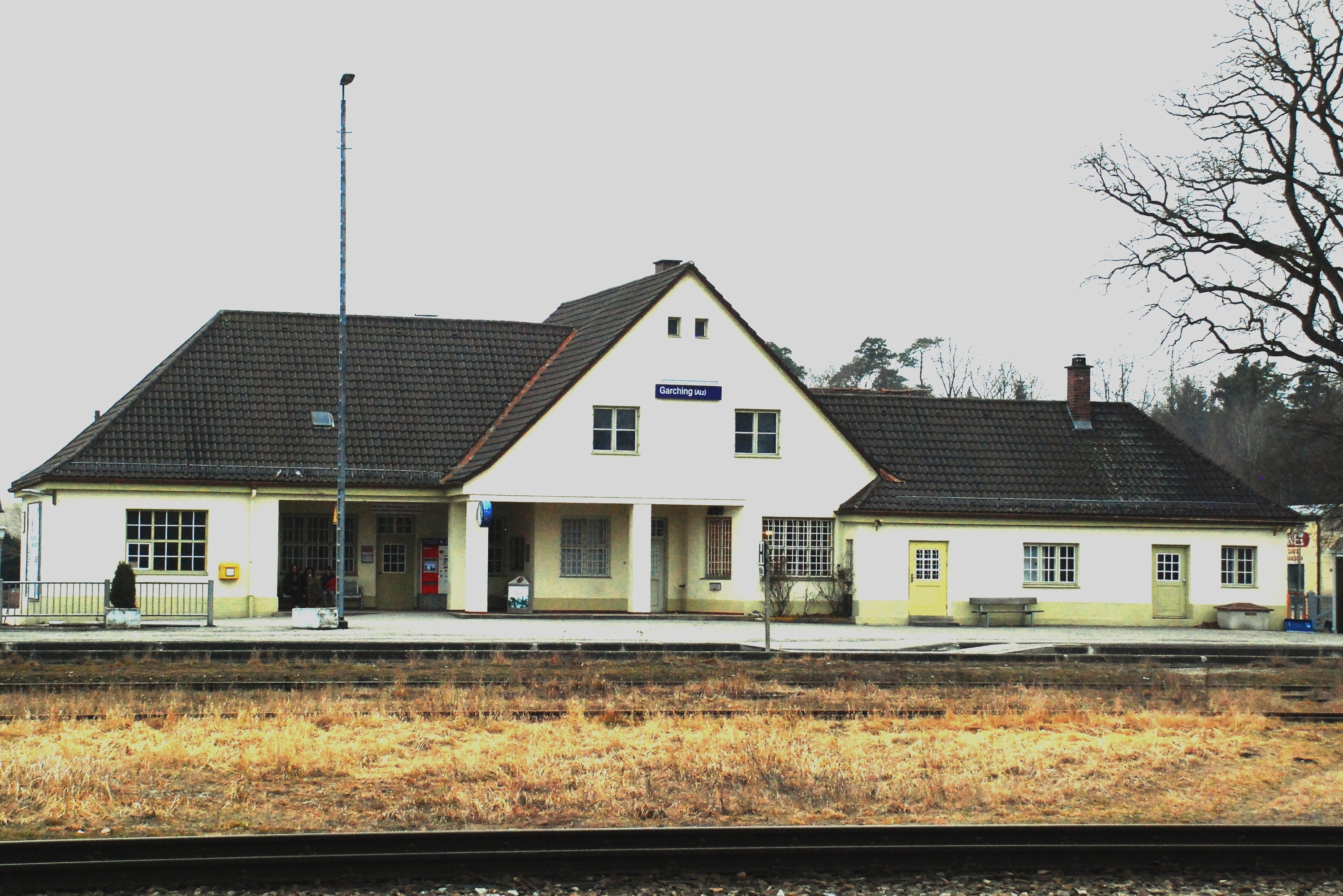 Bahnhof von Garching/Alz, Landkreis Altötting, Regierungsbezirk Oberbayern, Bayern.